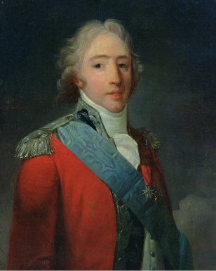 Futur Charles X, représenté en uniforme de colonel-général des Suisses pendant son exil à Edimbourg en 1796